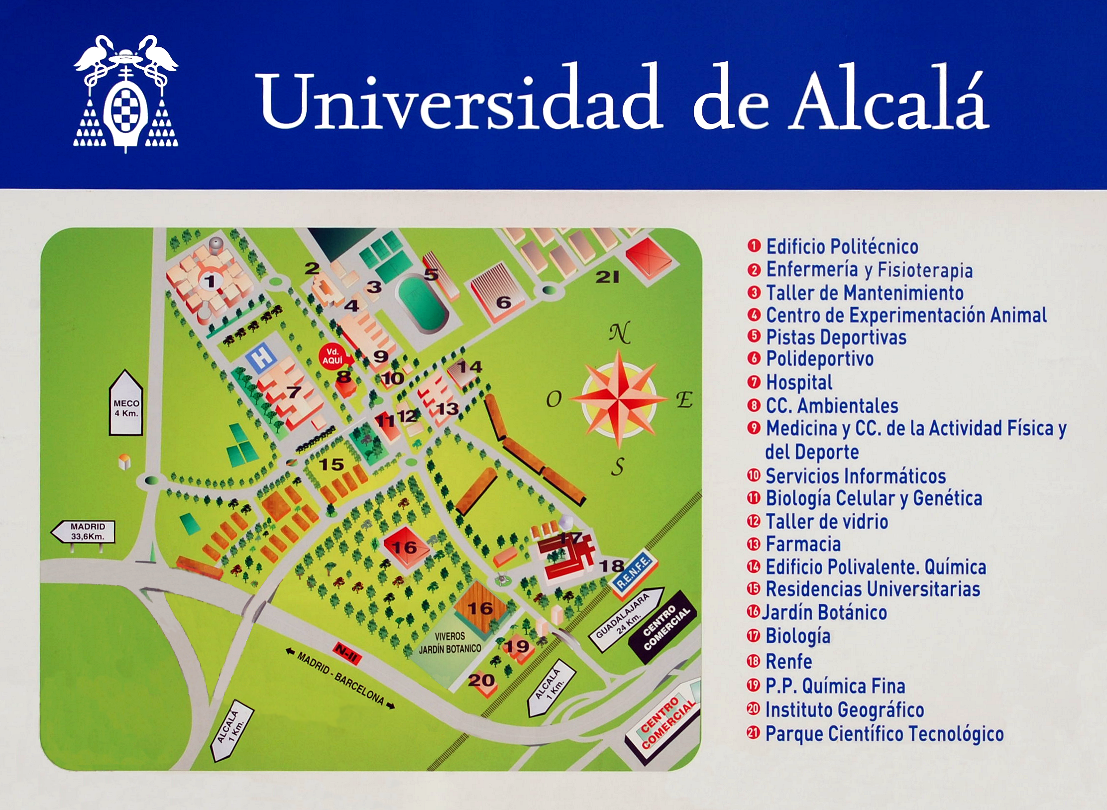 Plano general de las instalaciones del Campus Científico-Tecnológico (o externo) de la Universidad de Alcalá, situado al nordeste de la ciudad de Alcalá de Henares (Comunidad de Madrid - España). Cartel ubicado en las proximidades de la entrada principal a la Facultad de Medicina.